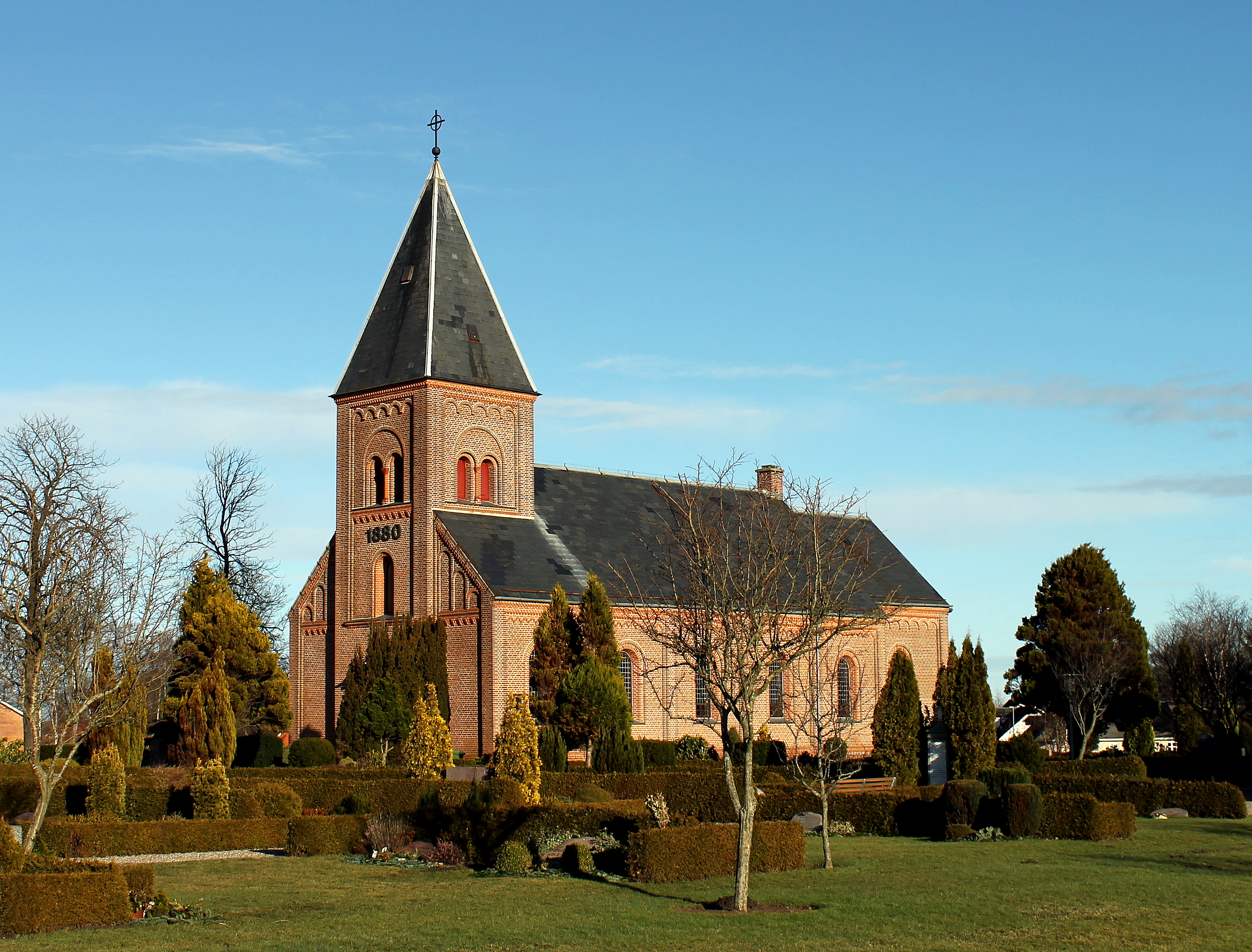 Øster Hassing Kirke, beliggende i Øster Hassing i Øster Hassing Sogn i Aalborg Stift. Kirken er opført i 1880 og tegnet af arkitekt J.E. Gnudtzmann